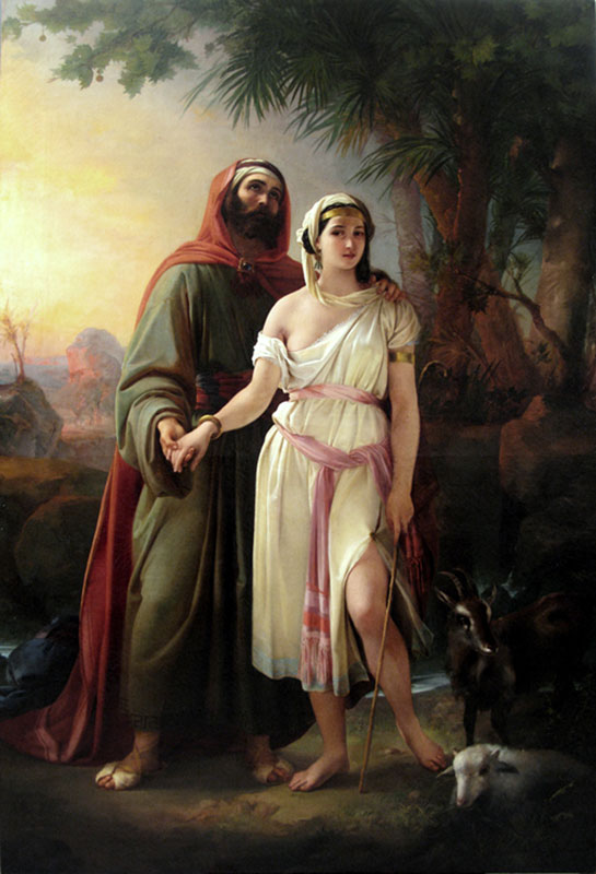 L’incontro di Giacobbe con Rachele